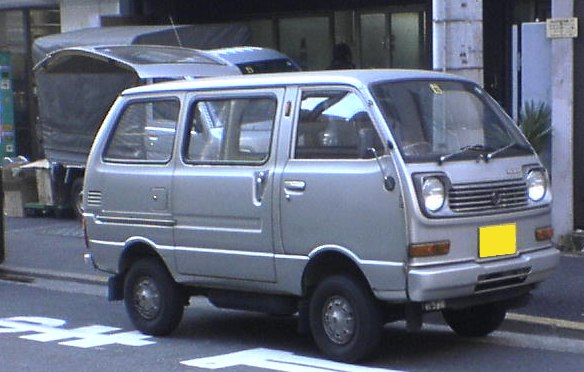 ハイゼットバン550（S40系） 2005年 東京都内にて 投稿者が撮影